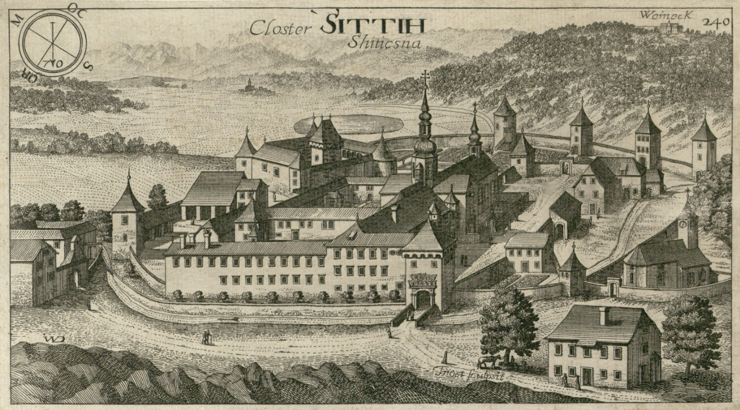 Samostan Stična